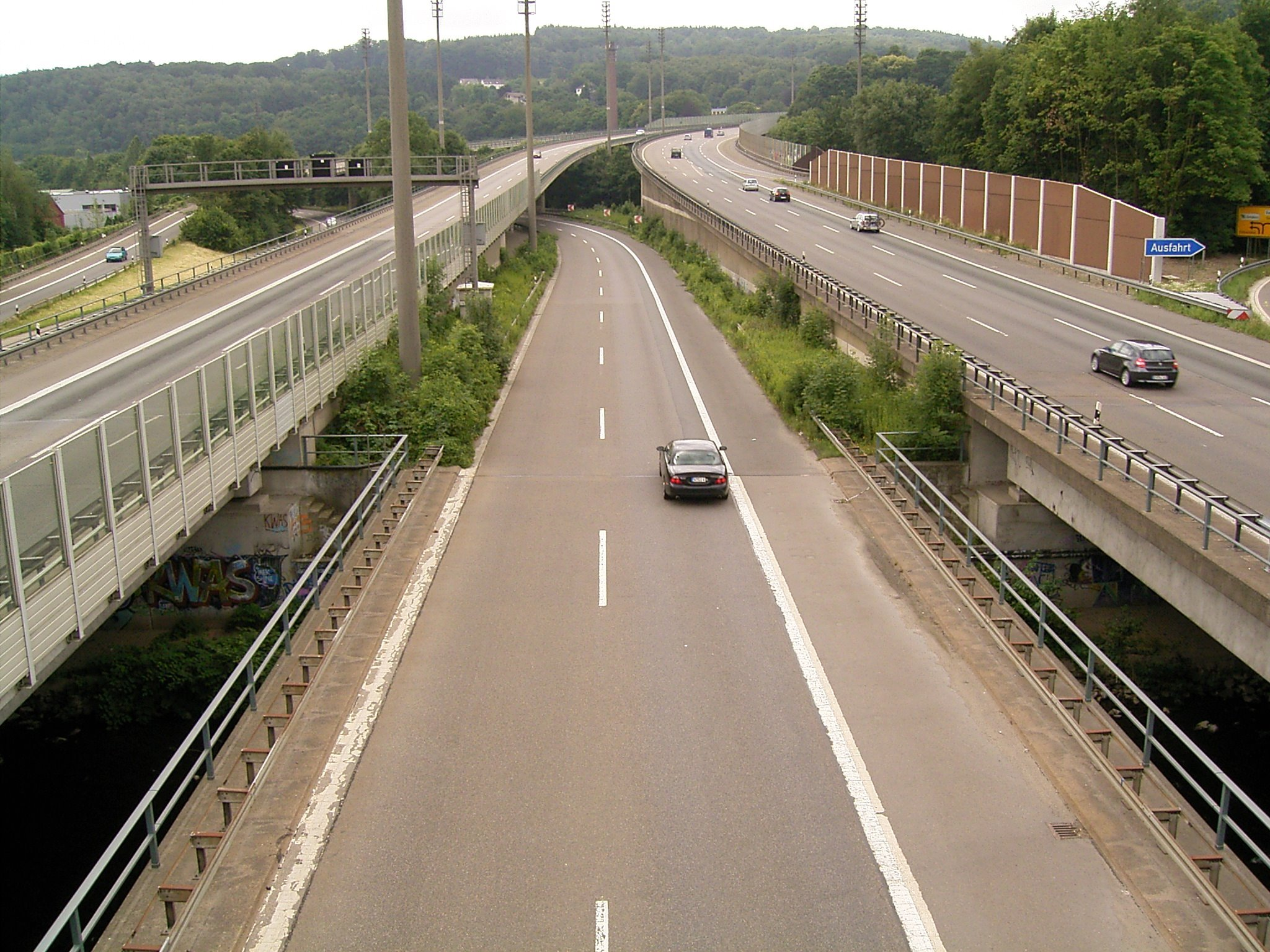 Wuppertalbrücke A46 Sonnborn in Wuppertal: L74 / B224 in Fahrtrichtung Süd